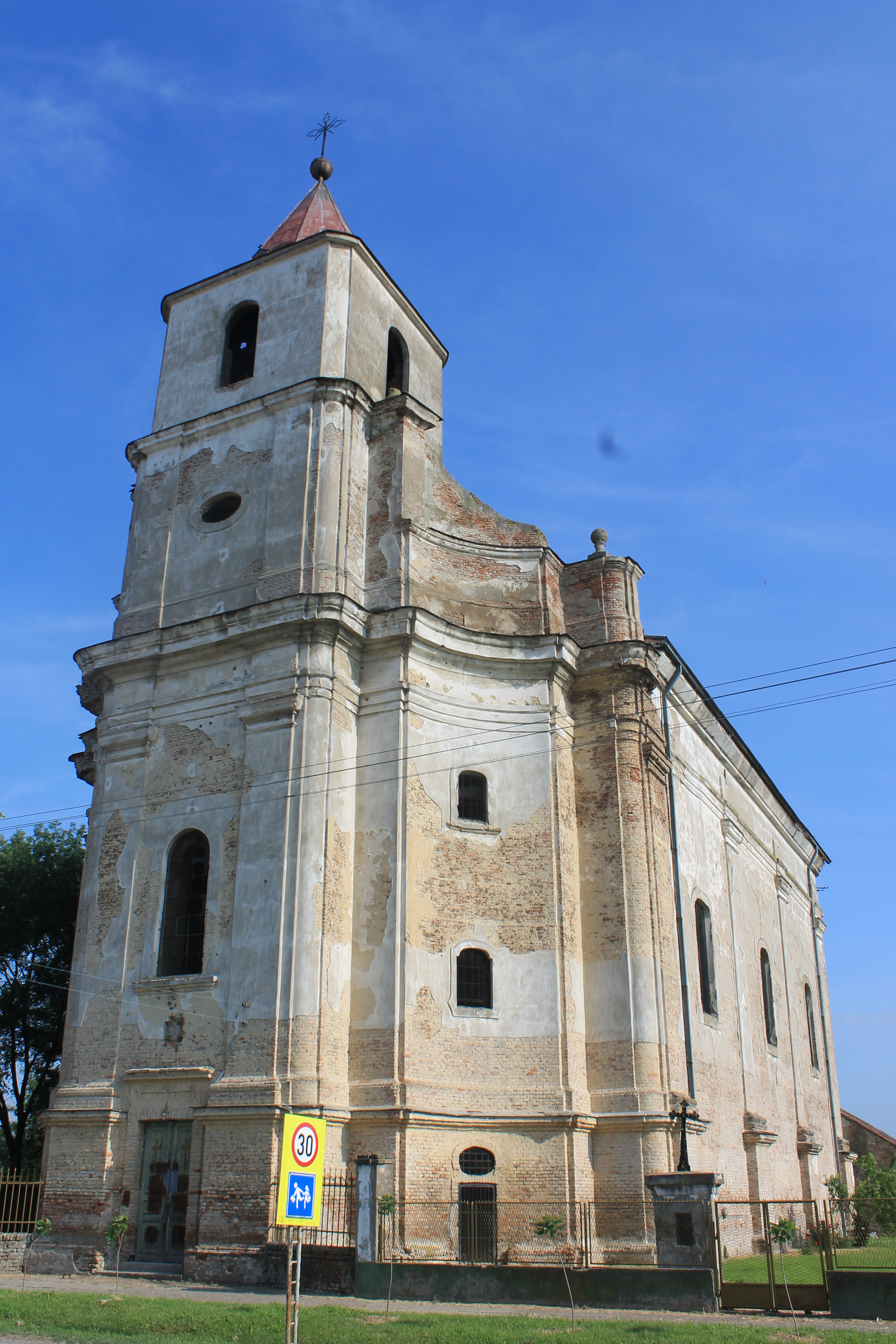 Rimokatolička crkva Svetog Trojstva (Kukujevci)